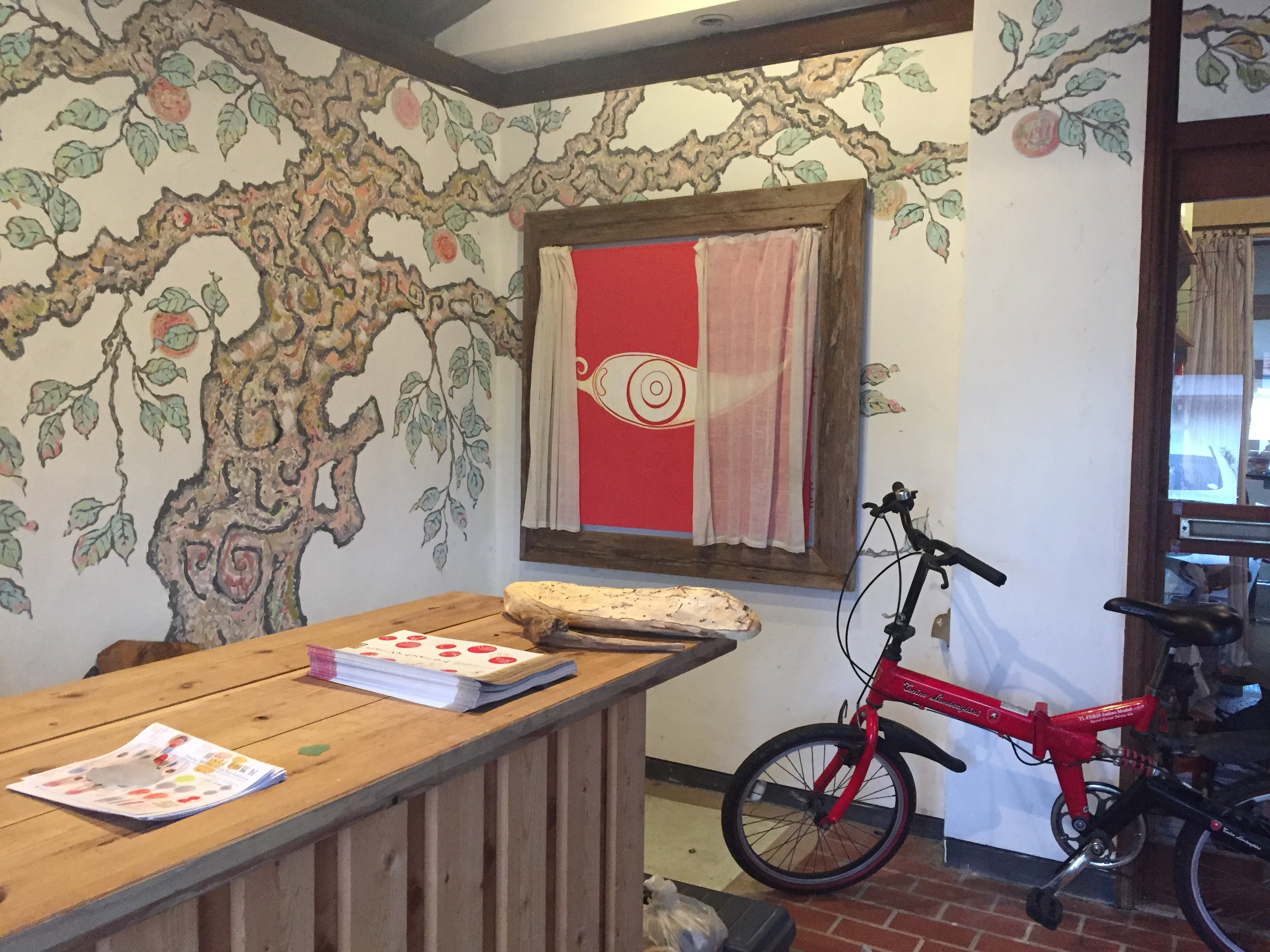 京丹後市網野町浜詰 ヒカリ美術館 1階エントランス（2019.2.11時点） ※この写真は美術館の許可を得て撮影をしました。